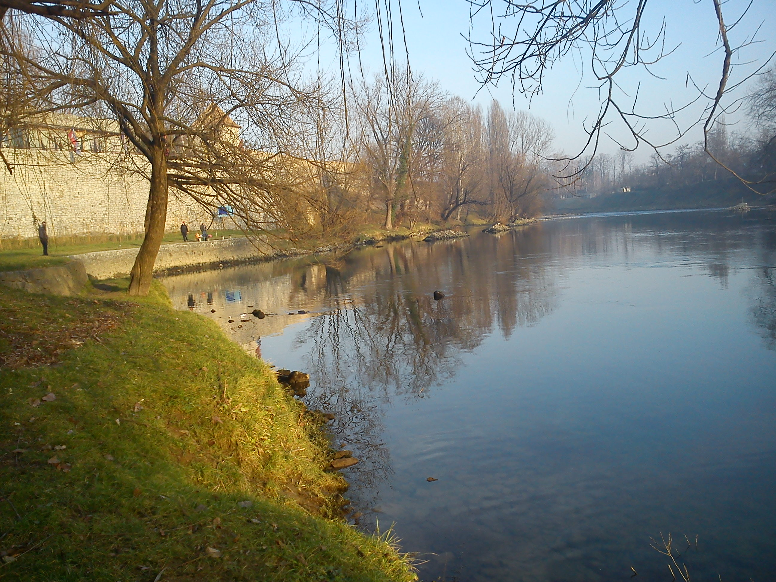 Ријека Врбас код Кастела